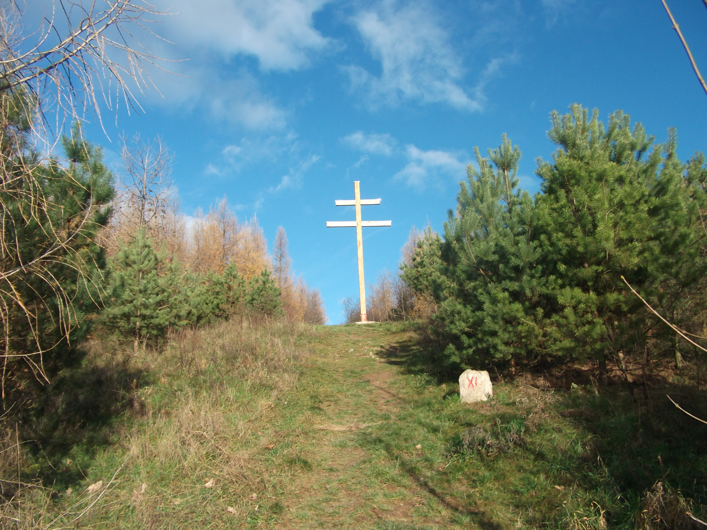 Slovenský dvojkríž na kopci Háj nad Lamačom a 11. zastavenie krížovej cesty.